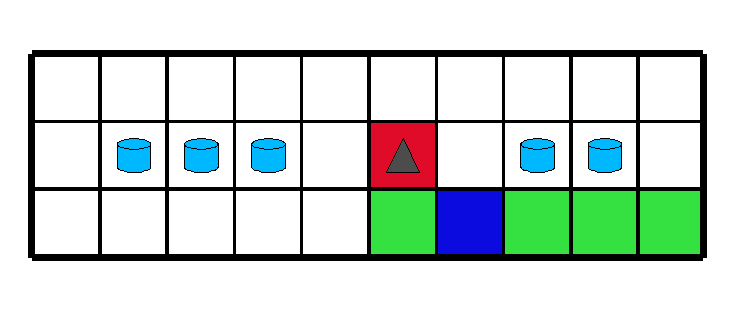 Situación de las fichas formando barrera en el Senet (Cilíndricas)